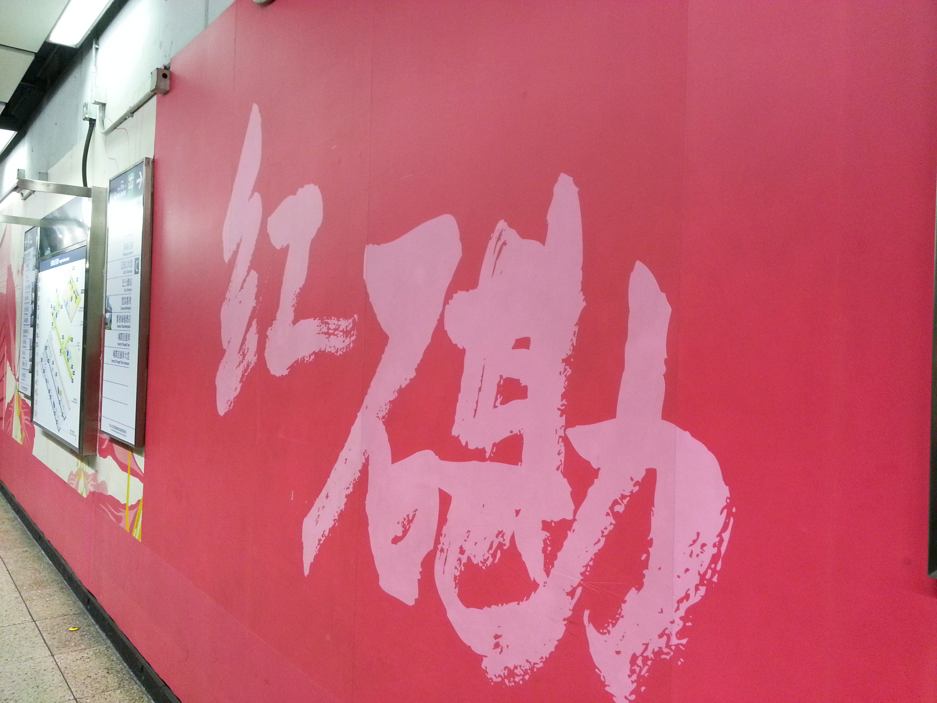 紅磡站書法字